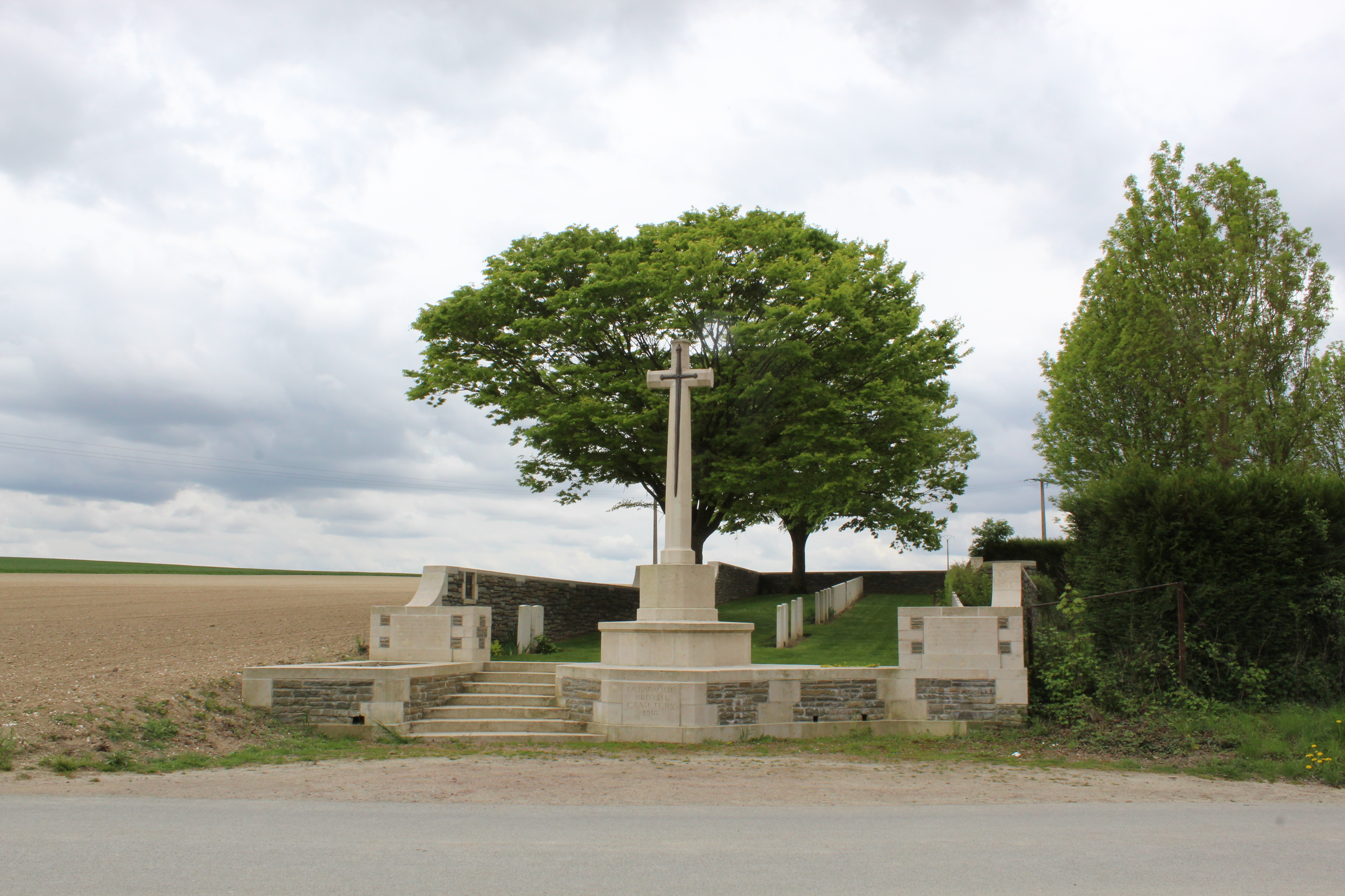 British Cemetery de Bellenglise